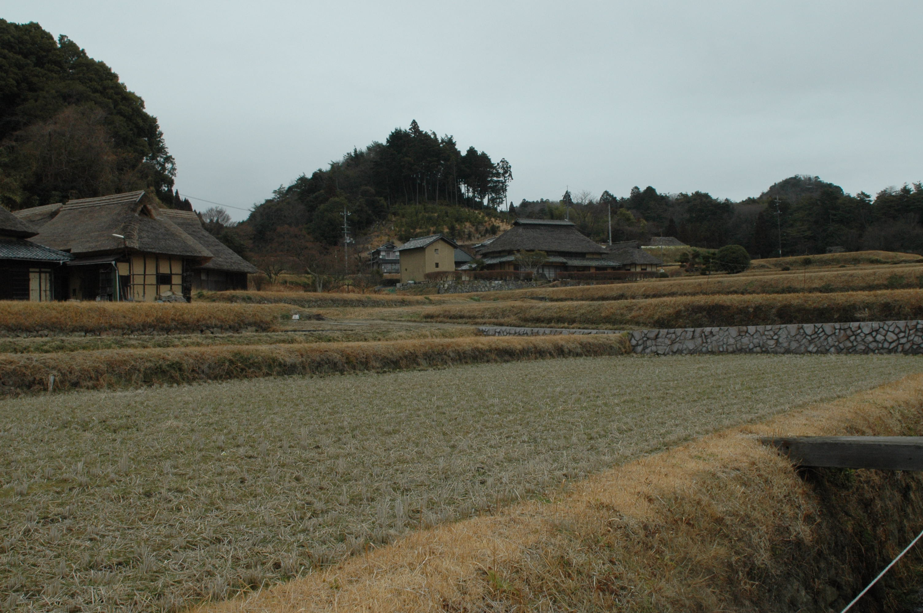 八塔寺ふるさと村の景色